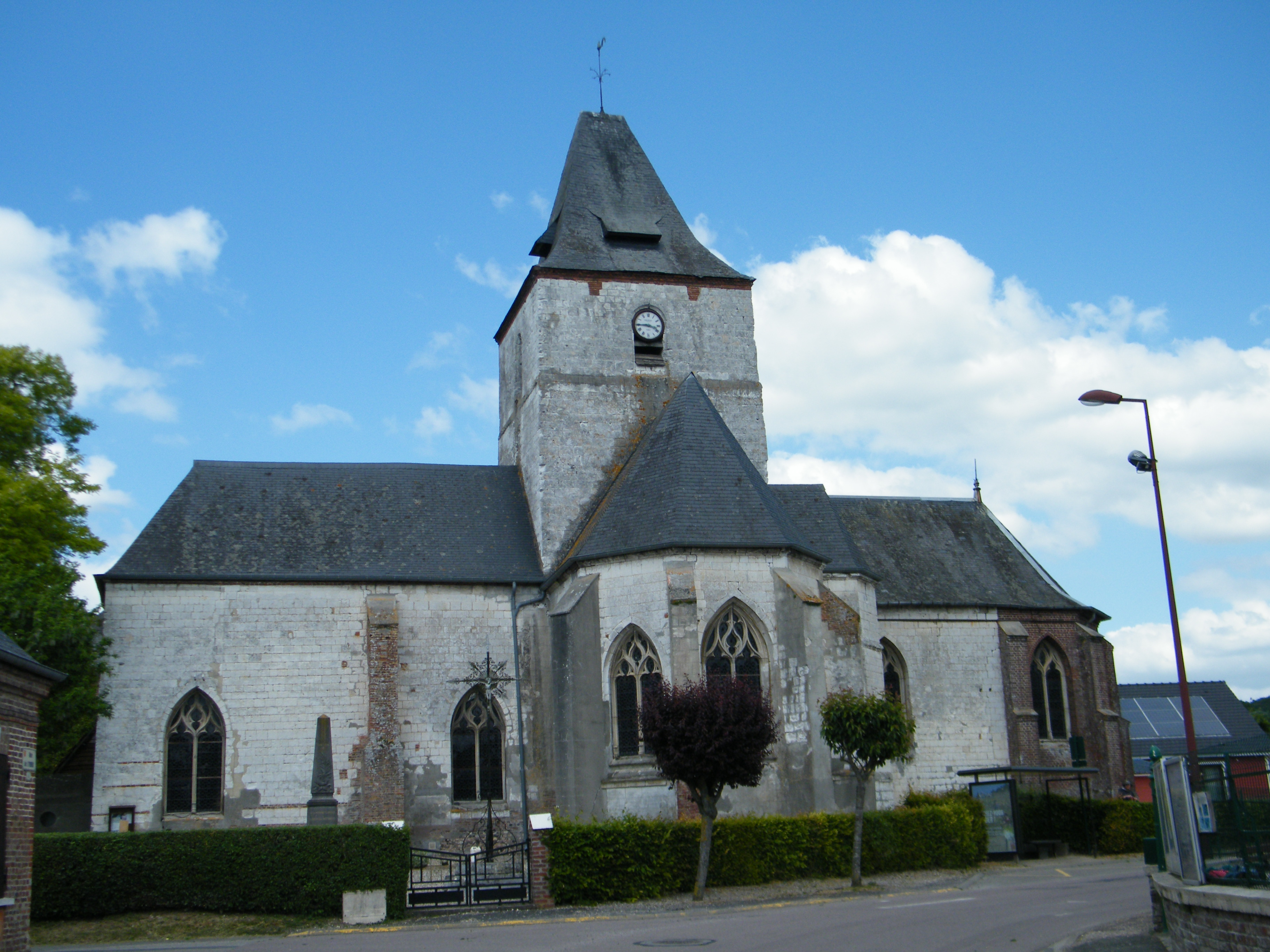 L'église.